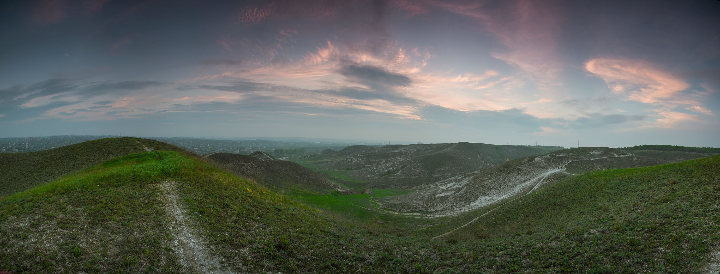 Краматорський, м. Краматорськ